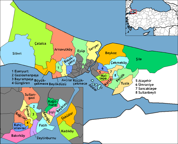 Map of the districts of İstanbul province in Turkey. Created by Rarelibra 20:58, 1 December 2006 (UTC) for public domain use, using MapInfo Professional v8.5 and various mapping resources. Further edited by One Homo Sapiens Effective 2009, shows new Arnavutköy, Ataşehir, Başakşehir, Beylikdüzü, Çekmeköy, Esenyurt, Sancaktepe, and Sultangazi districts. Elimination of Eminönü district, and boundary adjustments to Avcılar, Büyükçekmece, Çatalca, Esenler, Eyüp, Fatih, Gaziosmanpaşa, Kadıköy, Kartal, Küçükçekmece, Pendik, Silivri, Ümraniye, and Üsküdar districts. Source: İstanbul Büyükşehir Belediyesi [ibb-gov-tr].